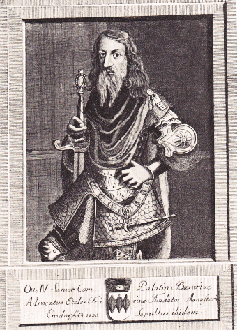 Otto IV. von Wittelsbach, Gründer von Kloster Ensdorf The Series Imaginum Augustae Domus Boicae, ad Genuina Ectypa Aliaque Monum Fide Digna delin. et Aaeri Incidit, Monachium (A Series of Portraits of the Noble House of Bavaria...) is a genealogical series of portraits of members of the House of Wittelsbach engraved by Joseph Anton Zimmermann after contemporary and old portraits by different artists, and published since 1773.